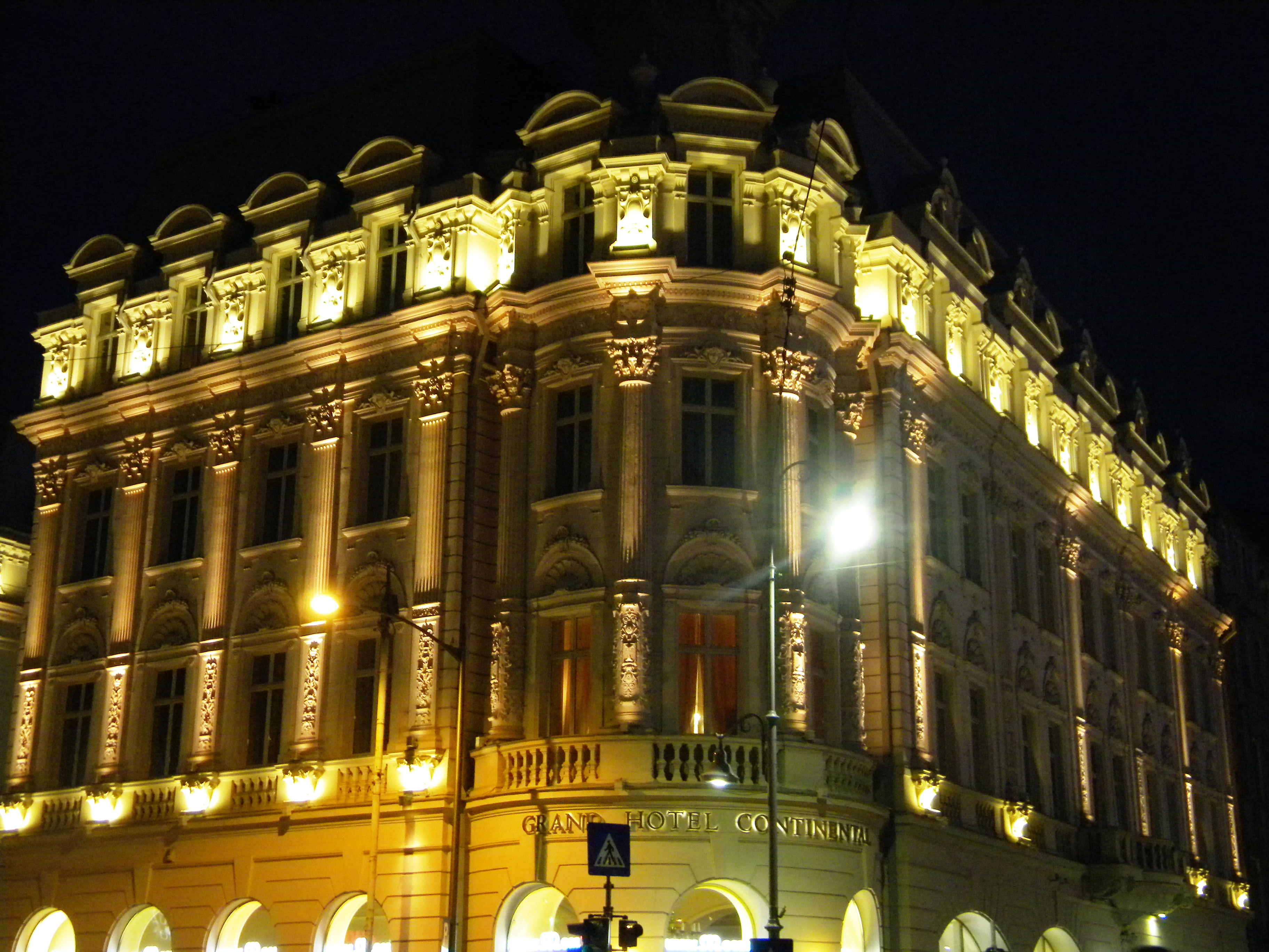 Bucuresti Romania, GRAND HOTEL CONTINENTAL (Imagine luata la Festivalul Luminilor, 23-25.04.2015)